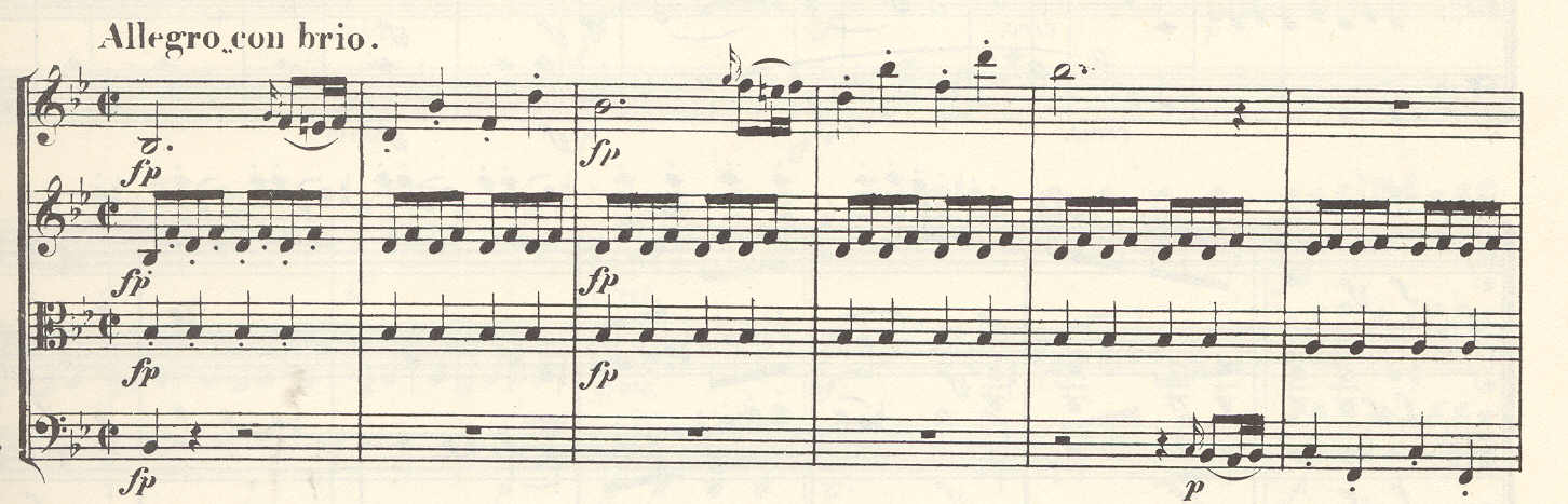 Strijkkw 6 Beethoven 4e deel 1e thema (in viool)